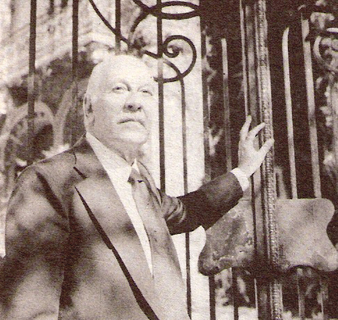 Ulises Petyt de Murat, escritor argentino